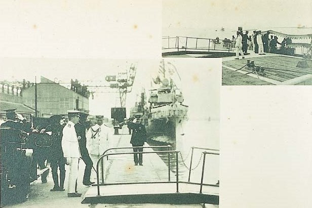 中文（台灣）: 壁岸御著艦載水雷艇御乘艇